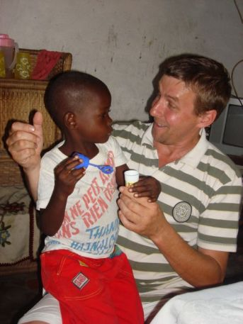 Humanitárius turizmus Kongóban